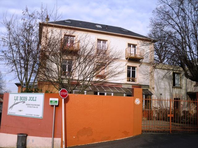 La maison de retraite du Bois Joli à Grigny (91)